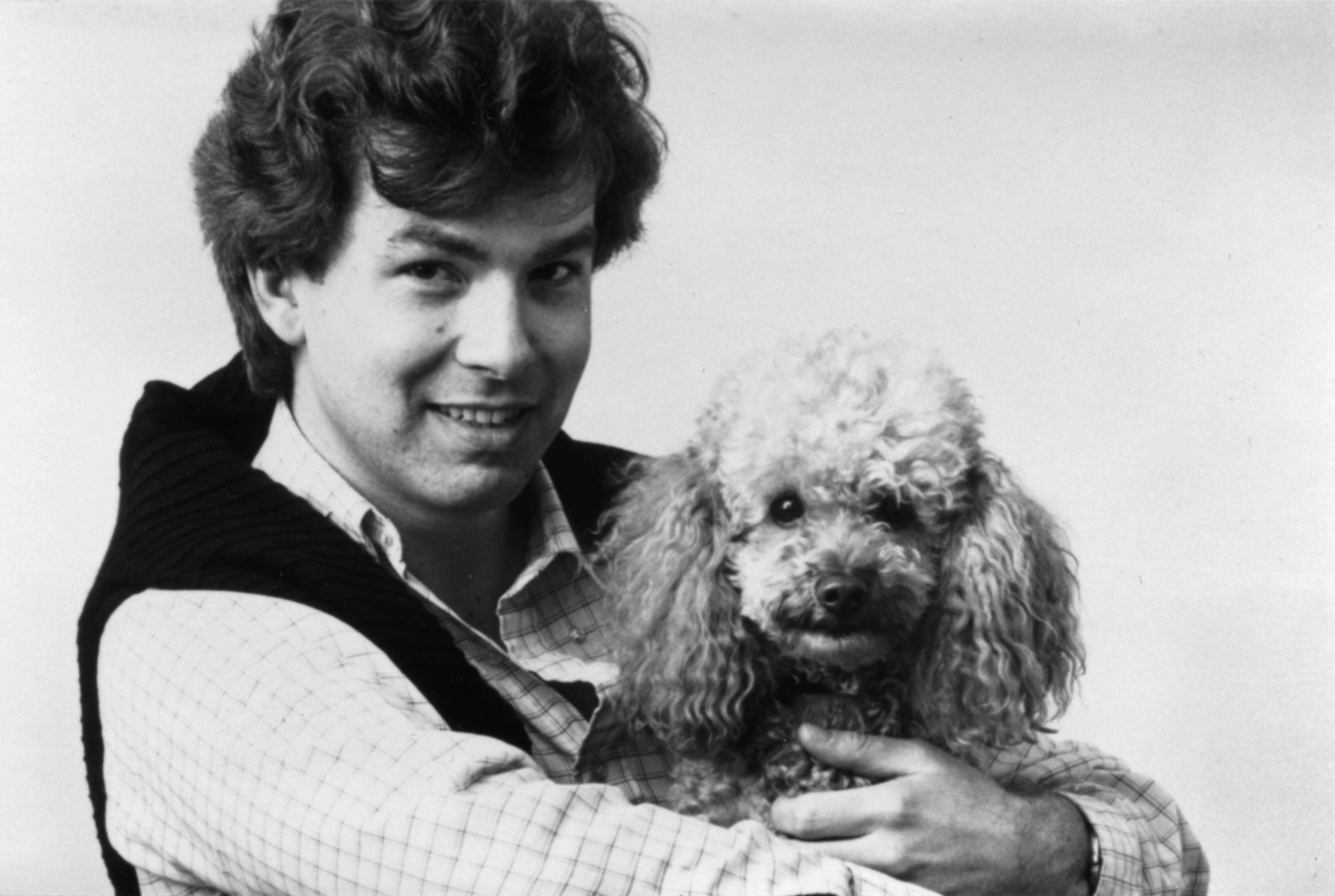 Peter Bree (links) en mascottte Nero (1980s)